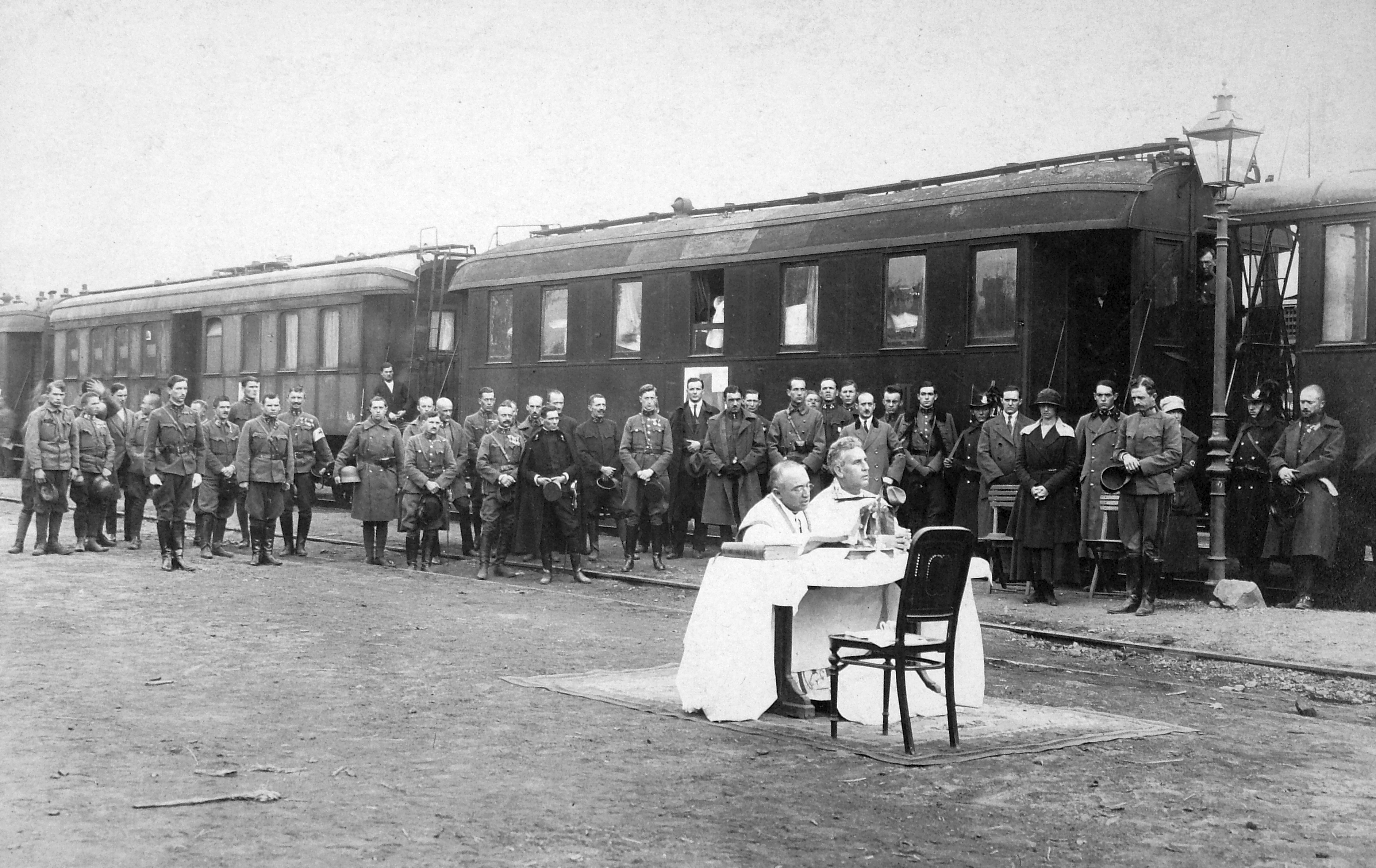 vasútállomás, tábori mise 1921. X. 22 én, IV. Károly király és Zita királyné (a lámpaoszloptól balra) visszatérése során. Location: Hungary, Biatorbágy Tags: railway, celebrity, light, train station, coach, priest Title: vasútállomás, tábori mise 1921. X. 22 én, IV. Károly király és Zita királyné (a lámpaoszloptól balra) visszatérése során.